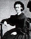 genoemde bron onjuist, komt van en die heeft het weer van het archief uit Zaltbommel. bron:Archief Zaltbommel